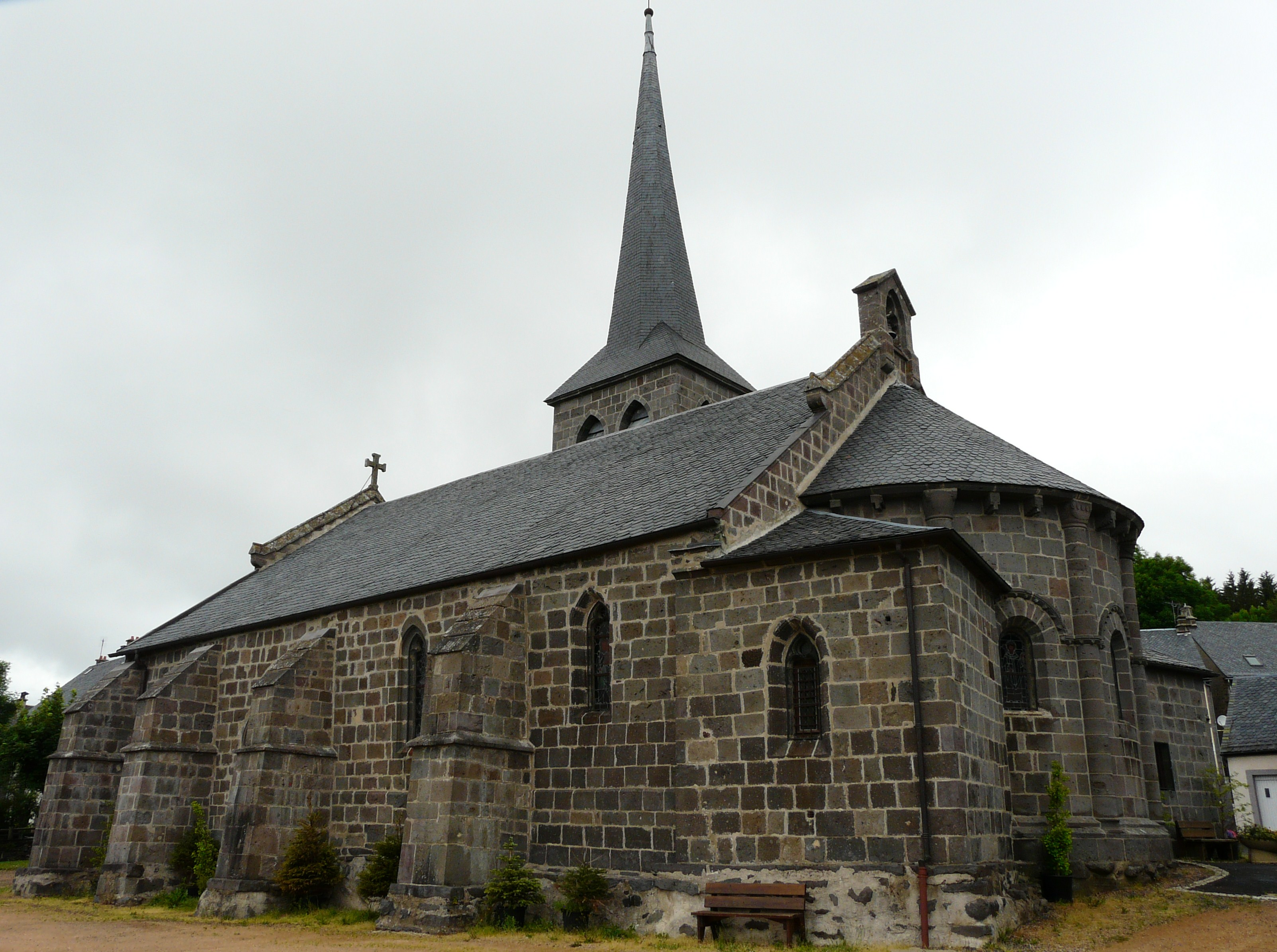 L'église Saint-Quintien de Picherande, Puy-de-Dôme, France.